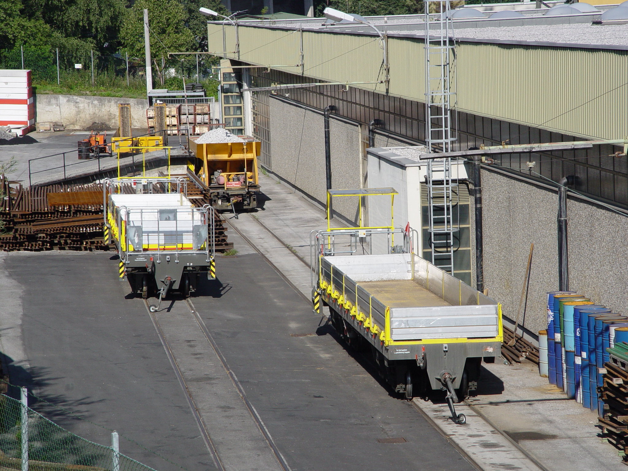 GW217, Lore 909 und Lore 910 hinter der Straßenbahnhalle der Innsbrucker Verkehrsbetriebe